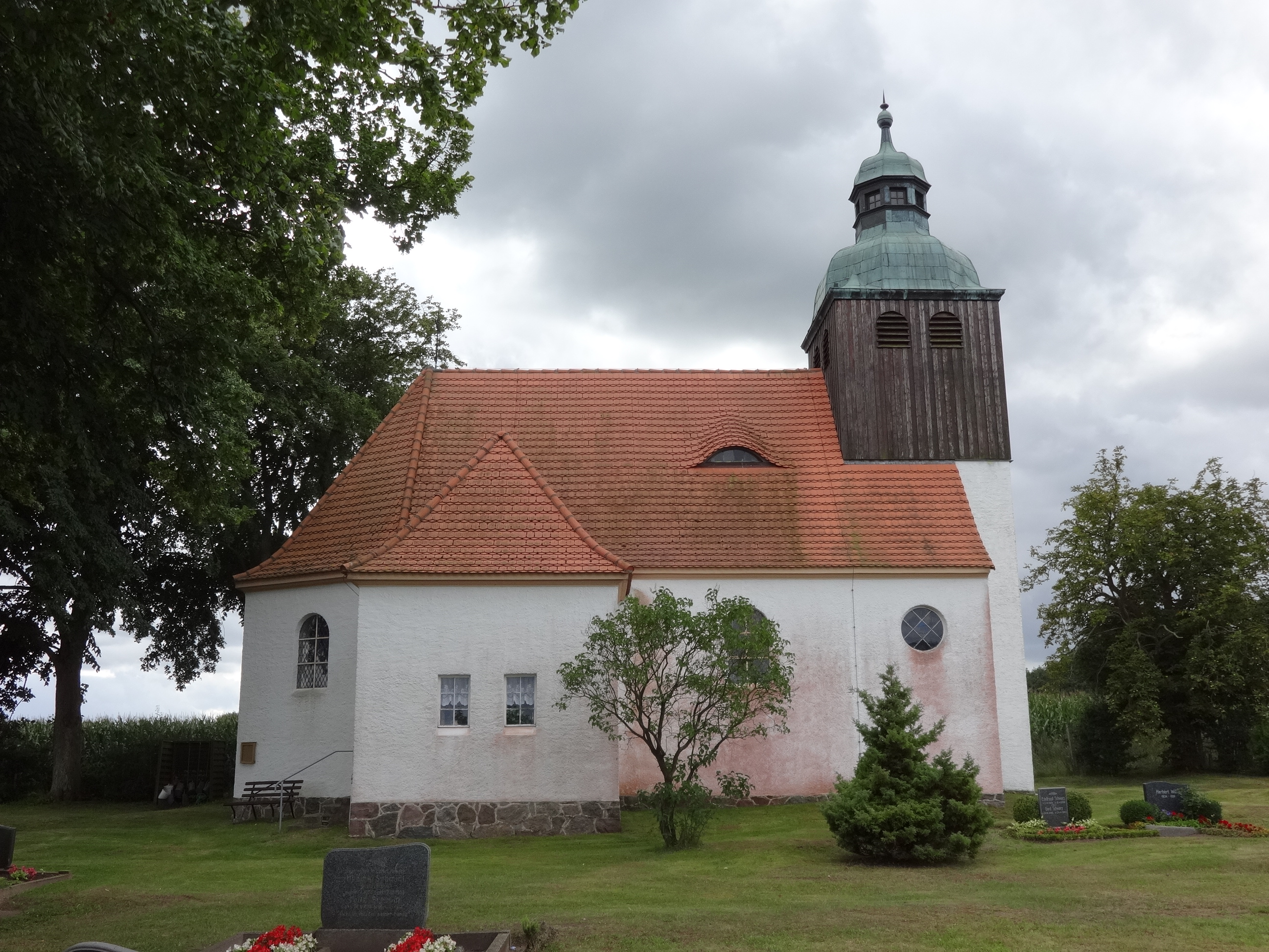 Dorfkirche Zemitz: Der schlichte Putzbau entstand im 18. Jahrhundert als Kapelle und wurde 1913 zur Saalkirche umgebaut. In dieser Zeit erhielt sie auch den barockisierenden Westturm. 1999 erfolgte die Namensgebung St. Michael nach einer umfassenden Sanierung. Im Inneren schlichte Ausstattung mit hölzerner Tonnendecke.